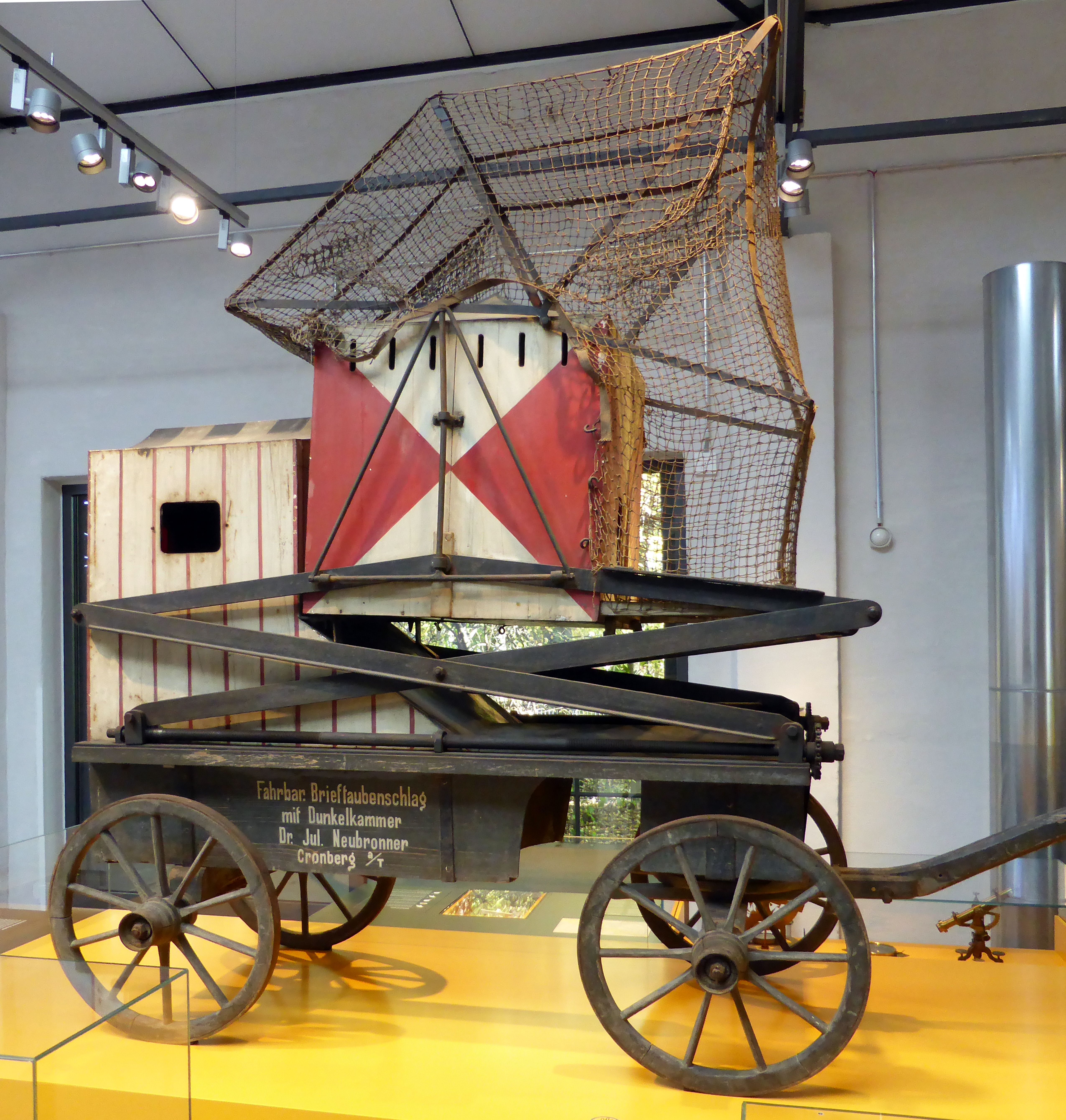 Fahrbarer Brieftaubenschlag im Deutschen Technikmuseum in Berlin. Wikipedianische KulTour am 10. Oktober 2015 in der Ausstellung des Museums.